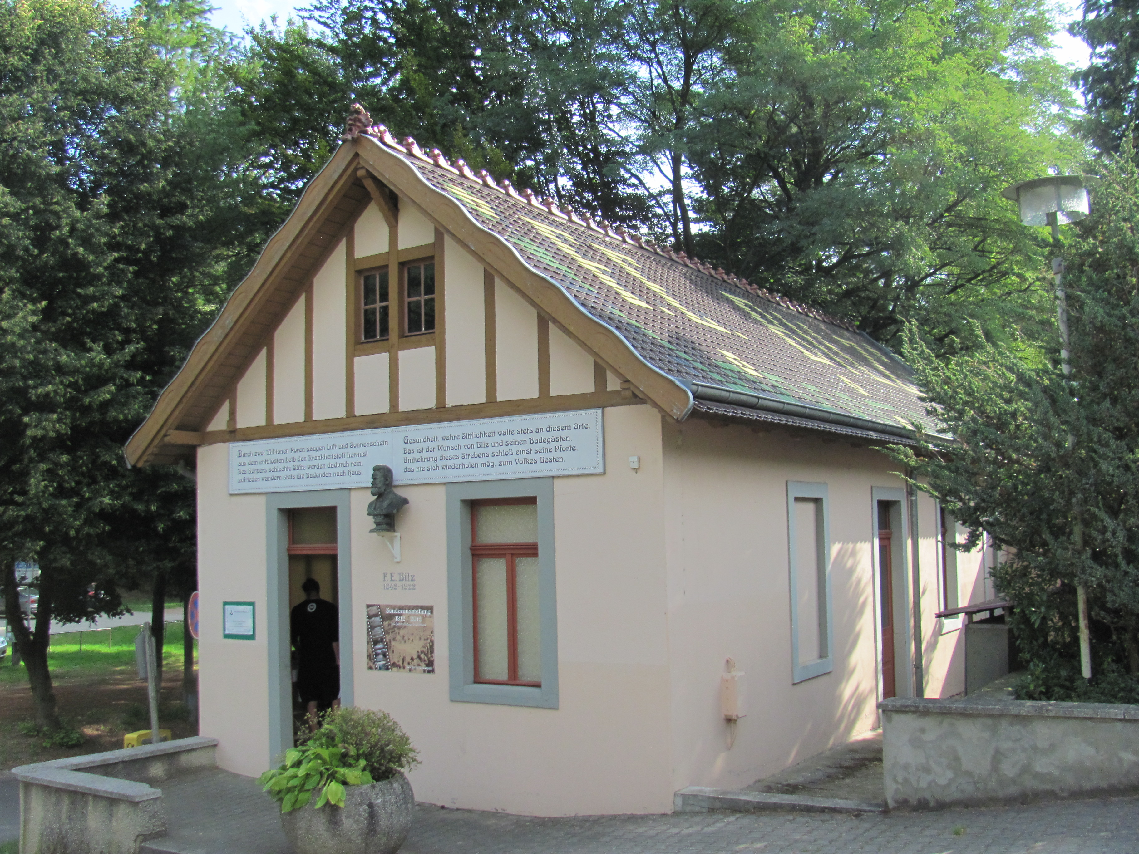 Bilzbad, Tag des offenen Denkmals 2015